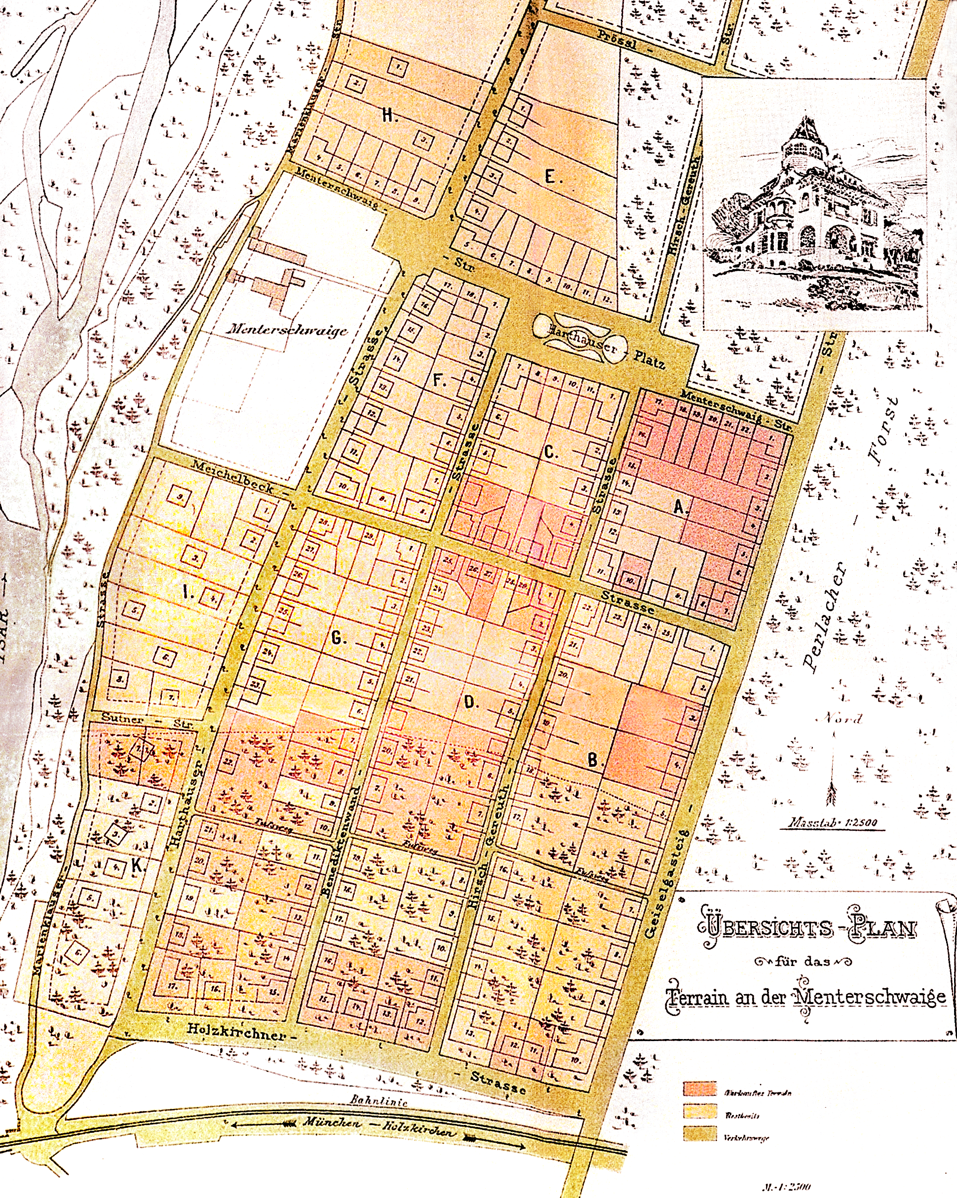 Übersichtsplan für das Terrain an der Menterschwaige. Karte des geplanten Villenkolonie Menterschweige des Bau- und Immobilienunternehmens Heilmann & Littmann, 1900